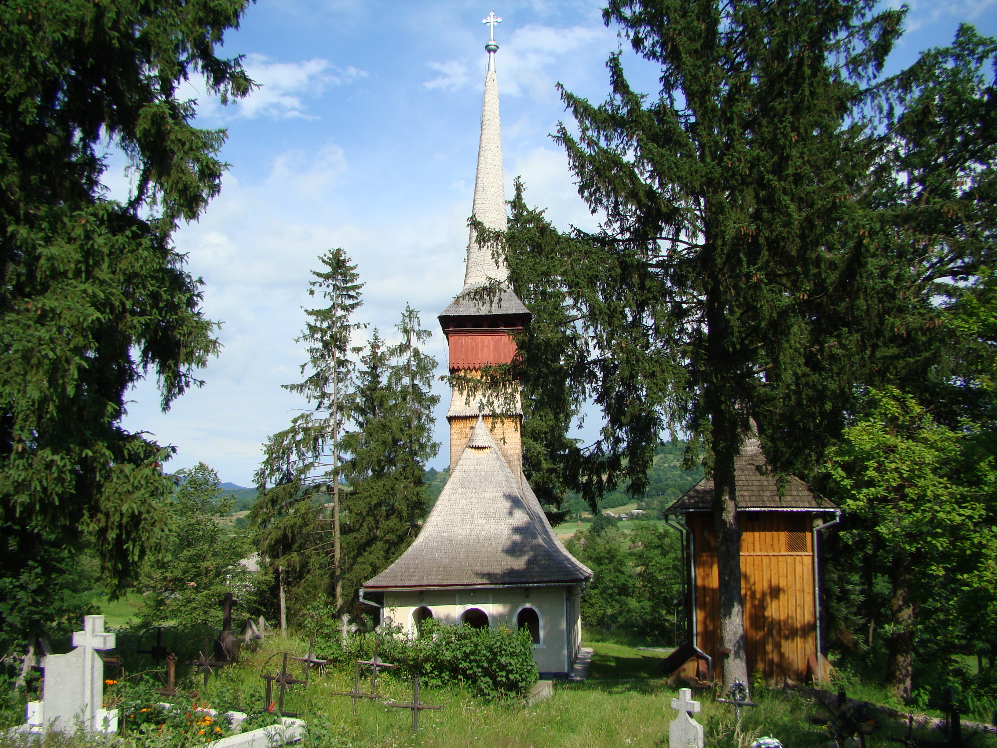 Biserica Sf.Nicolae din Berința